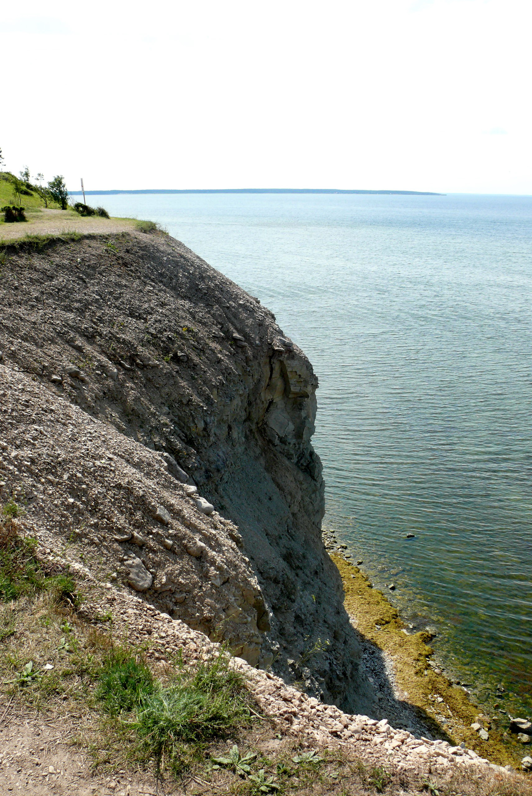 Panga pank Saaremaal Eestis